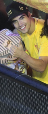 Ator Caio Castro